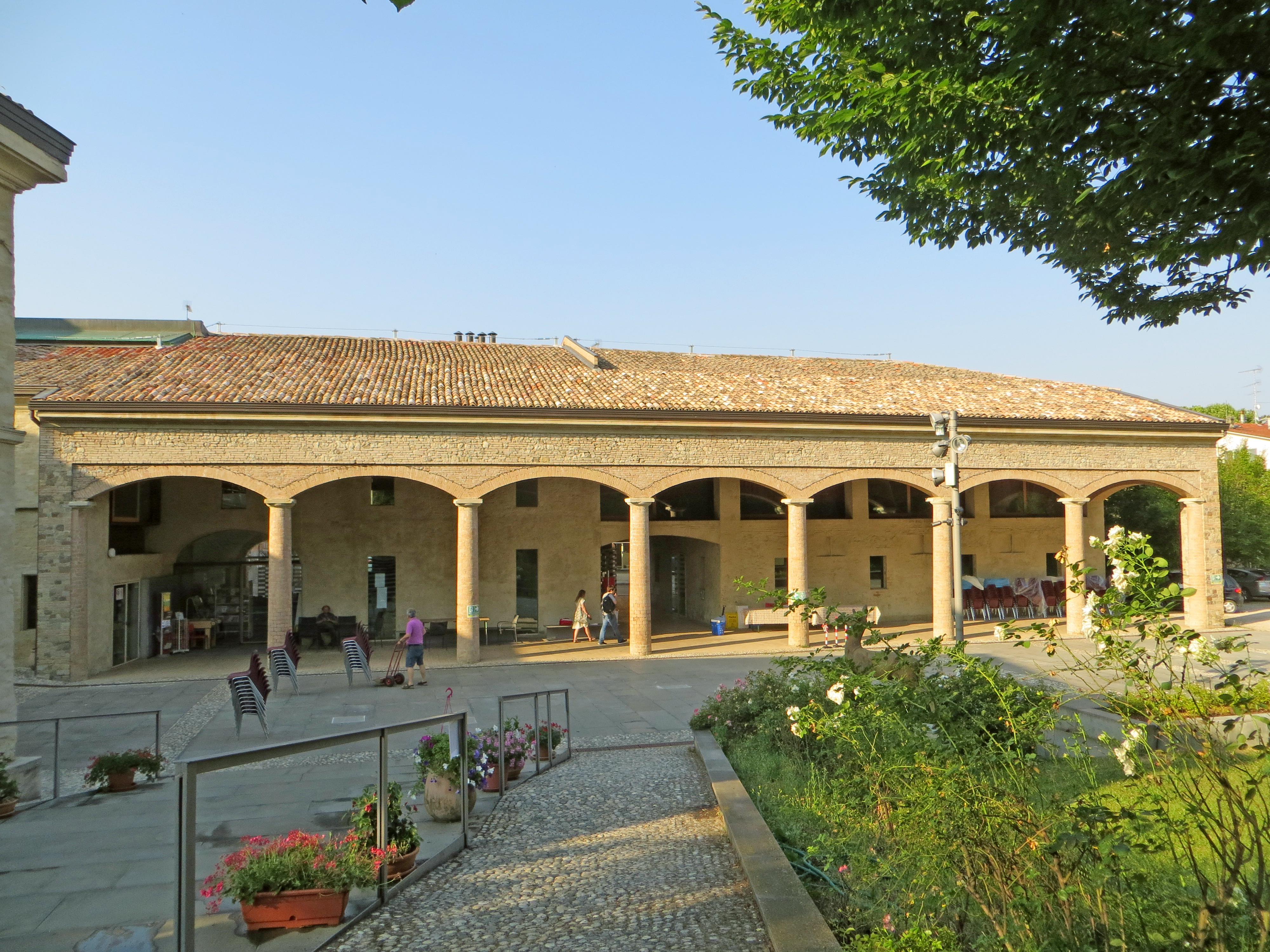 La Corte (Traversetolo) - porticato della corte